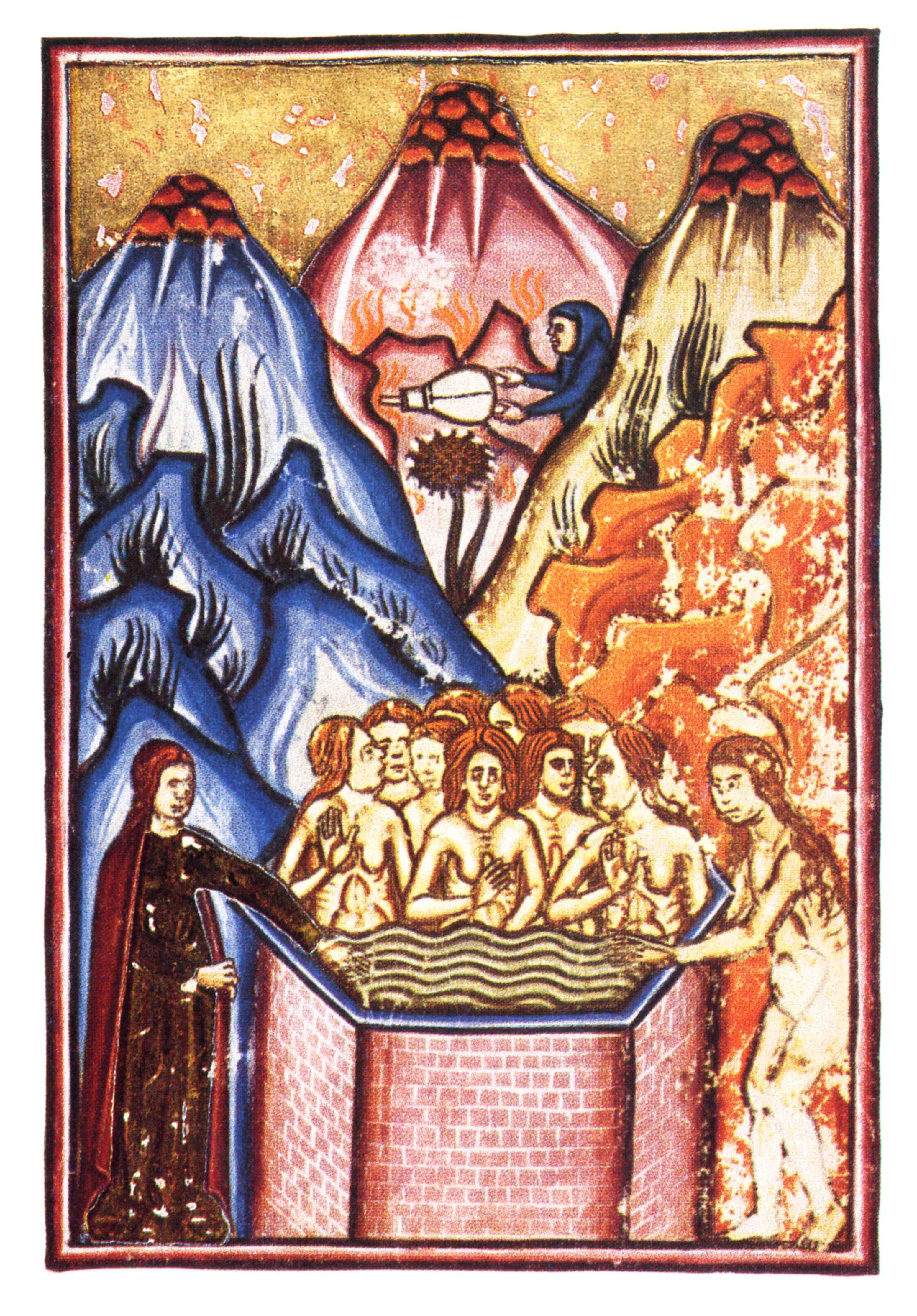 Pietro da Eboli (XIII secolo) "De Balneis Puteolanis". Miniatura del Codice Angelico Ms. 1474 (Biblioteca Angelica di Roma), che mostra il "Balneum Sulphatara", nel medioevo ritenuto miracoloso per la cura della sterilità femminile e per numerosi altri mali. La miniatura mostra un gruppo di donne immerse in una vasca esagonale per recuperare la fertilità, mentre sullo sfondo un personaggio incappucciato attizza con un soffietto le esalazioni sprigionate da piccoli vulcanetti e fumarole.